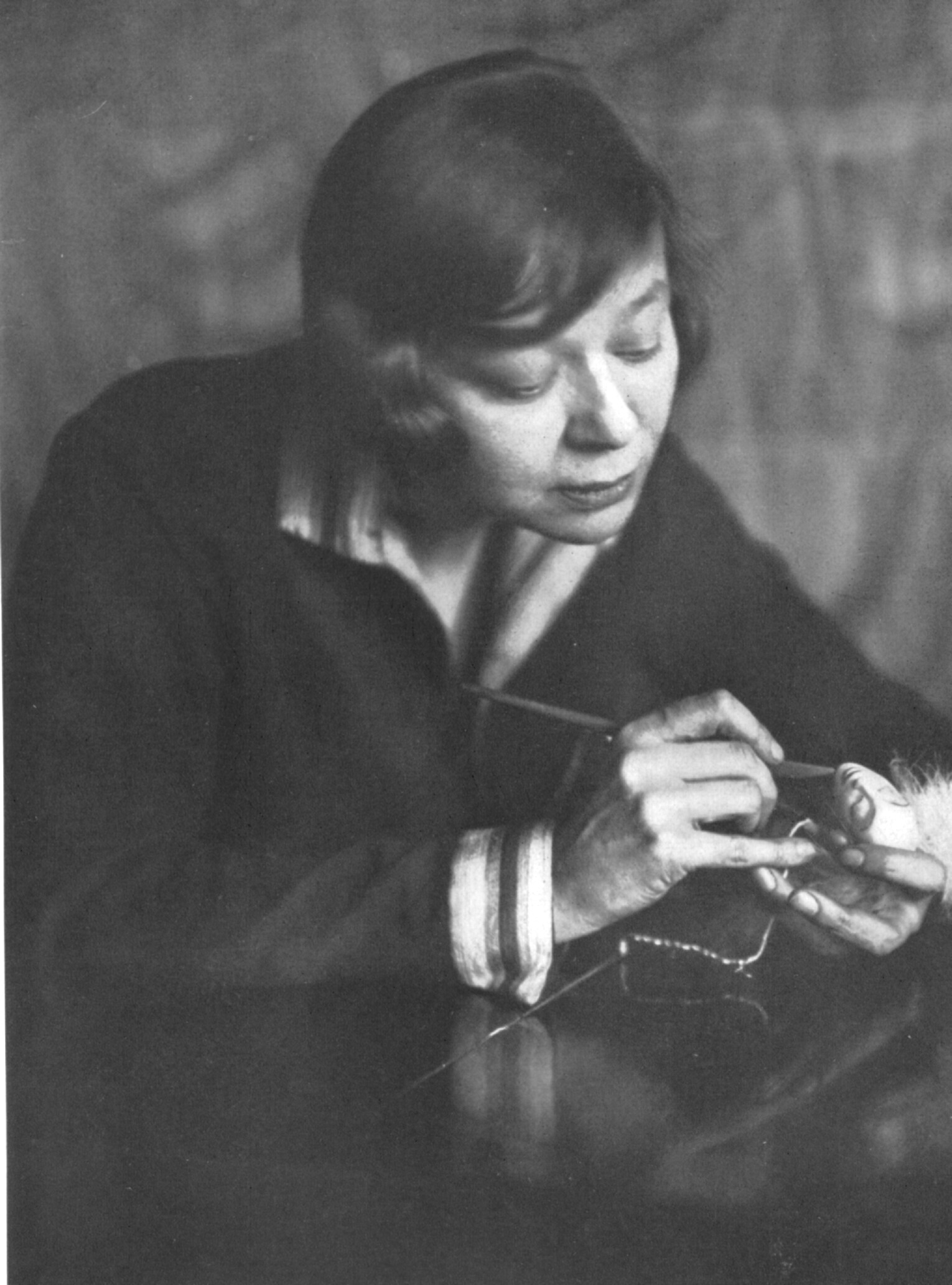 Porträt Lotte Pritzel, Foto von Wanda von Debschitz-Kunowski (1870-1935)